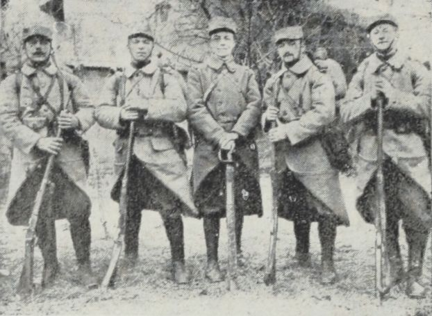 Quelques amis TAILLARD, VIRIOT, LARUE, CIRÉ, VAUTRIN. (Mars 1915 [à la formation du bataillon])